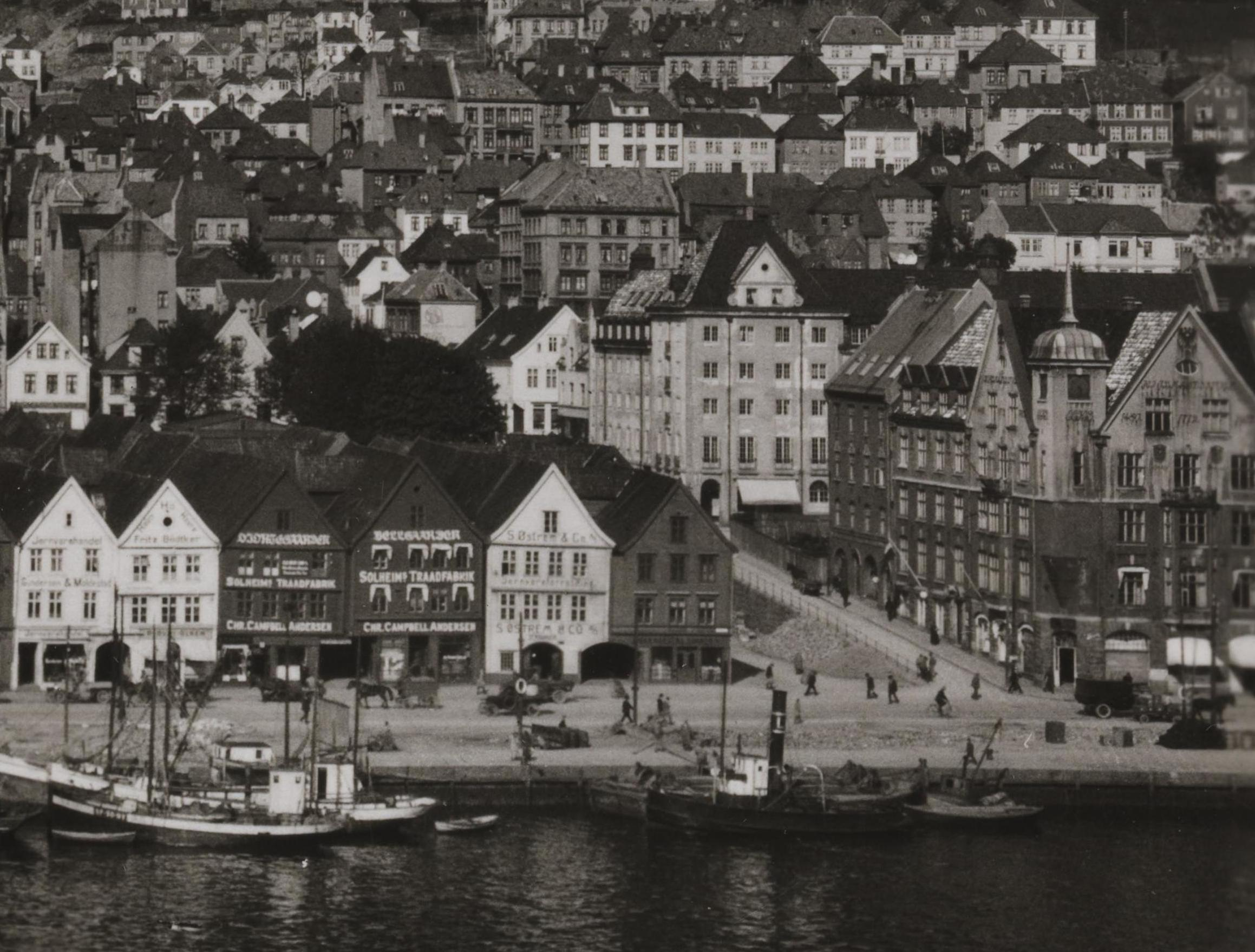 Bildet er hentet fra Nasjonalbibliotekets bildesamling Bryggen, Bergen, Hordaland